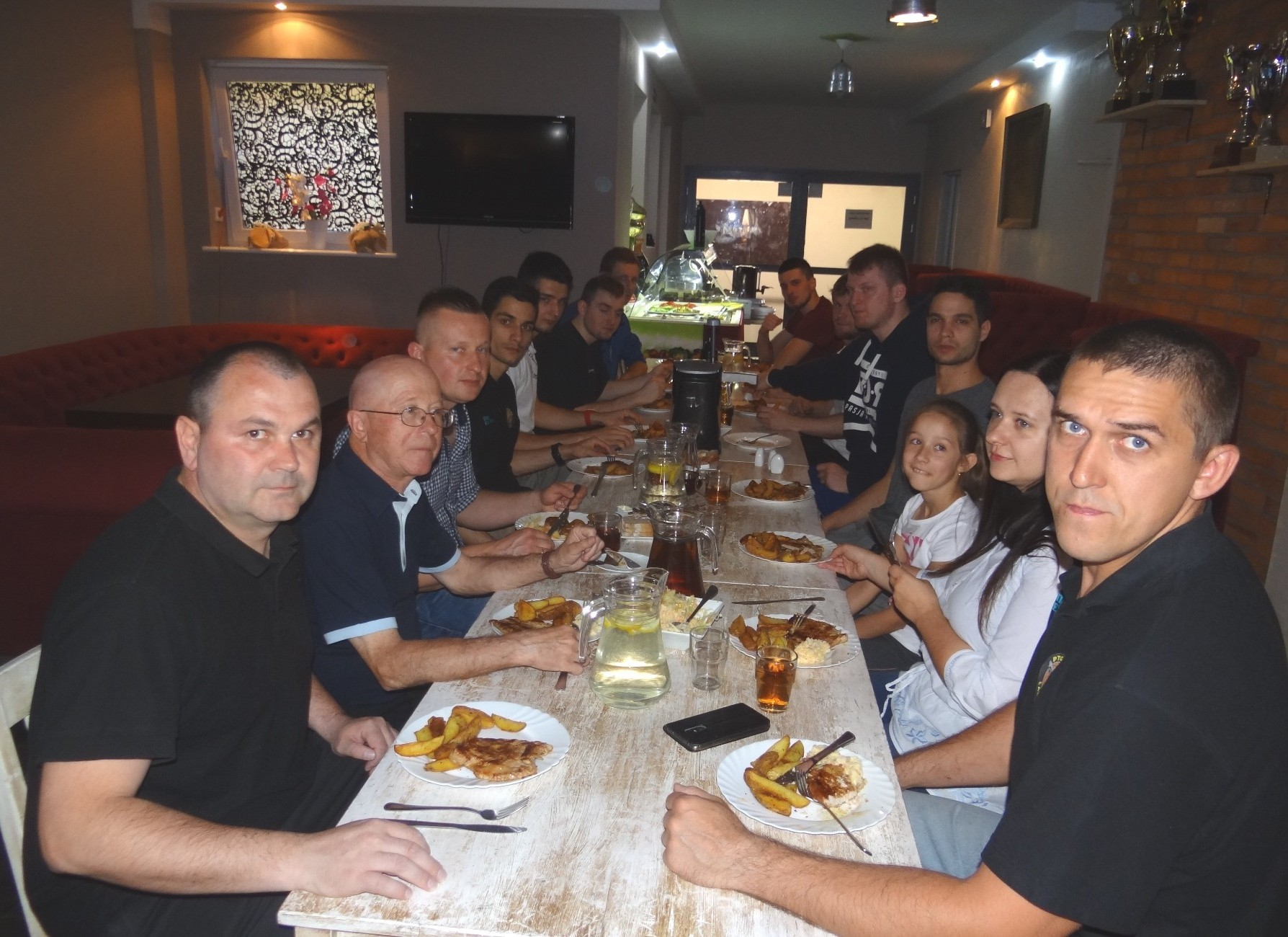 Sokół Łańcut w Stargardzie (13.05.2018)